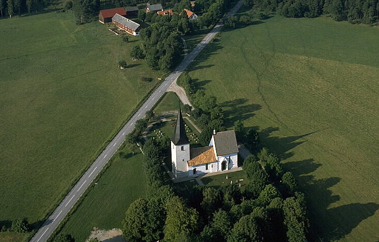 Motiv: Halla kyrka Nyckelord: Flygbilder, Riksintressen Kategori: KyrkomiljöHalla kyrka